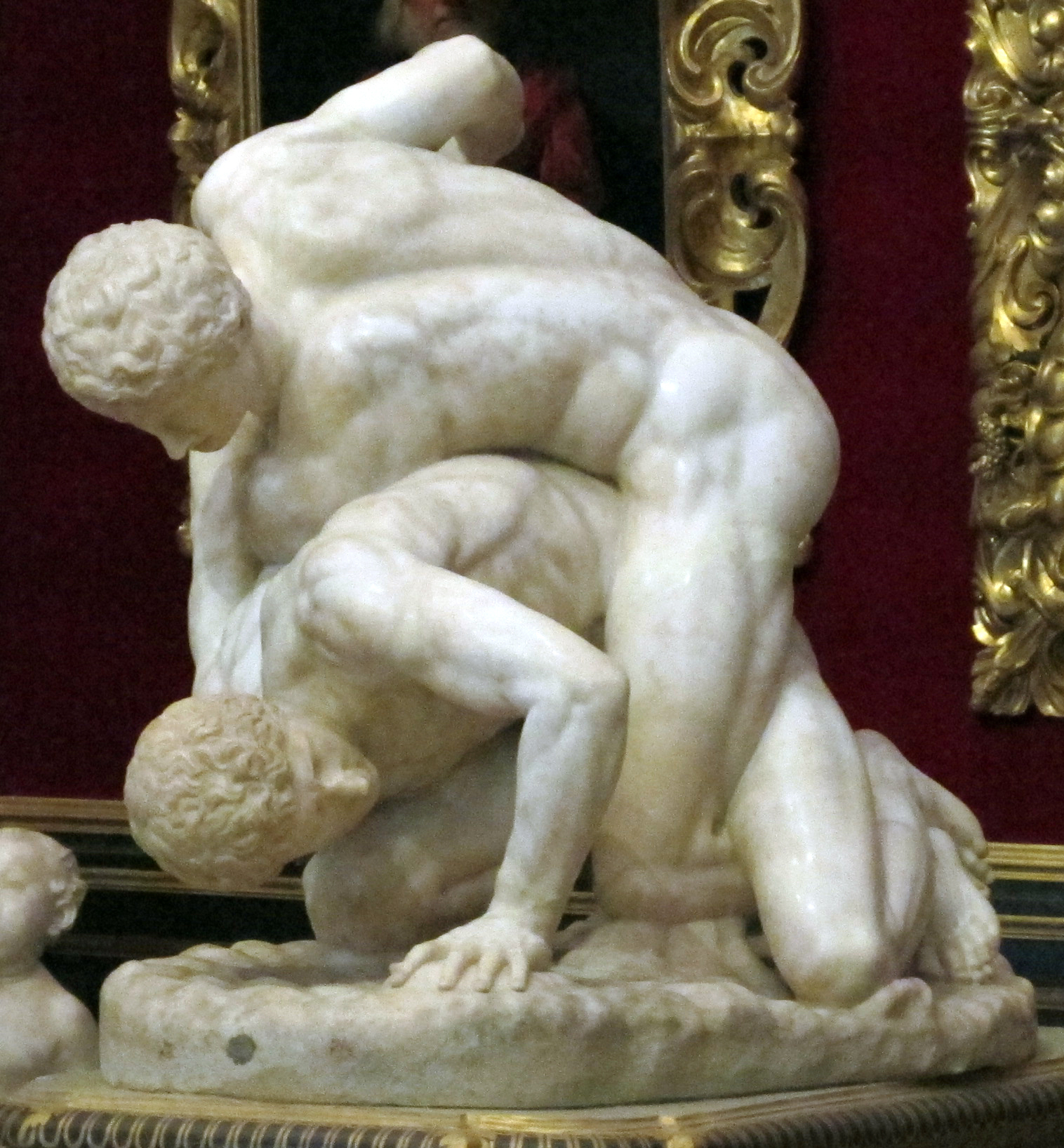 Lottatori, copia romana da un originale ellenistico di III sec. a. C.